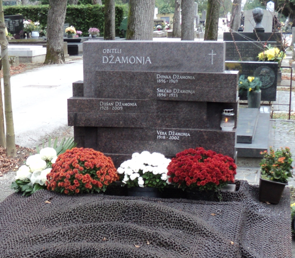 Grob porodice Džamonja